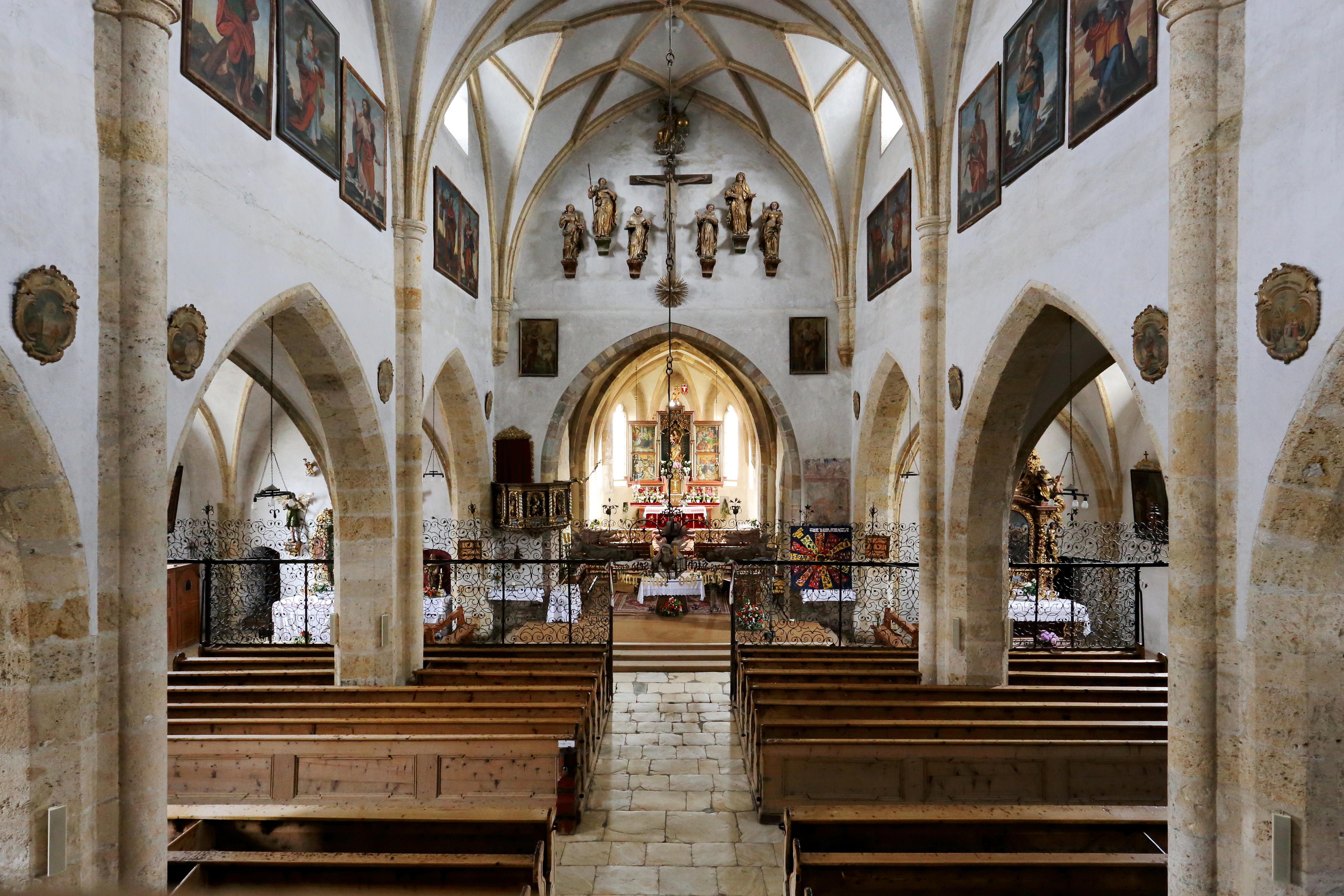 Innenansicht der katholischen Pfarr- und Wallfahrtskirche Unsere Liebe Frau Mariä Himmelfahrt in der Salzburger Gemeinde Mariapfarr.